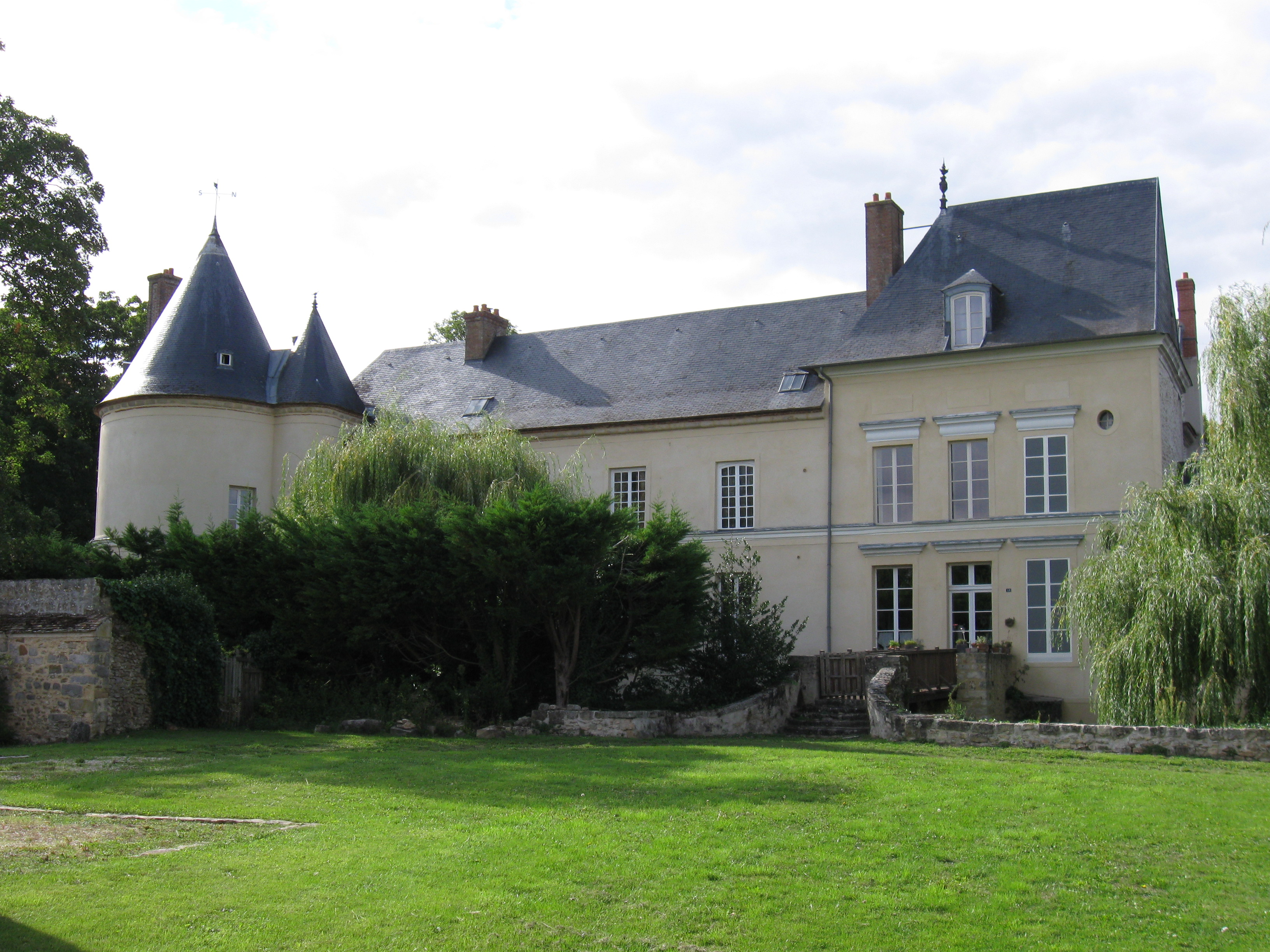 Château de Courtry (façade sud-est). (Sivry-Courtry, Seine-et-Marne, région Île-de-France). .